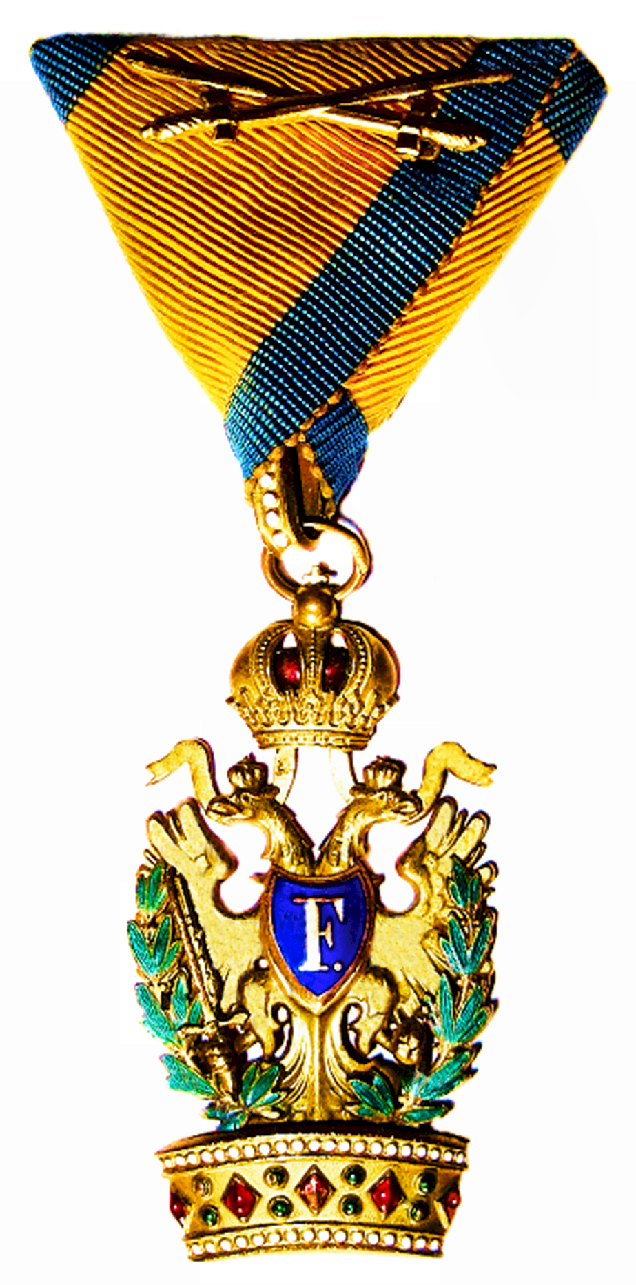 Orden der Eisernen Krone (Österreich) mit (KD.) und Schwertern